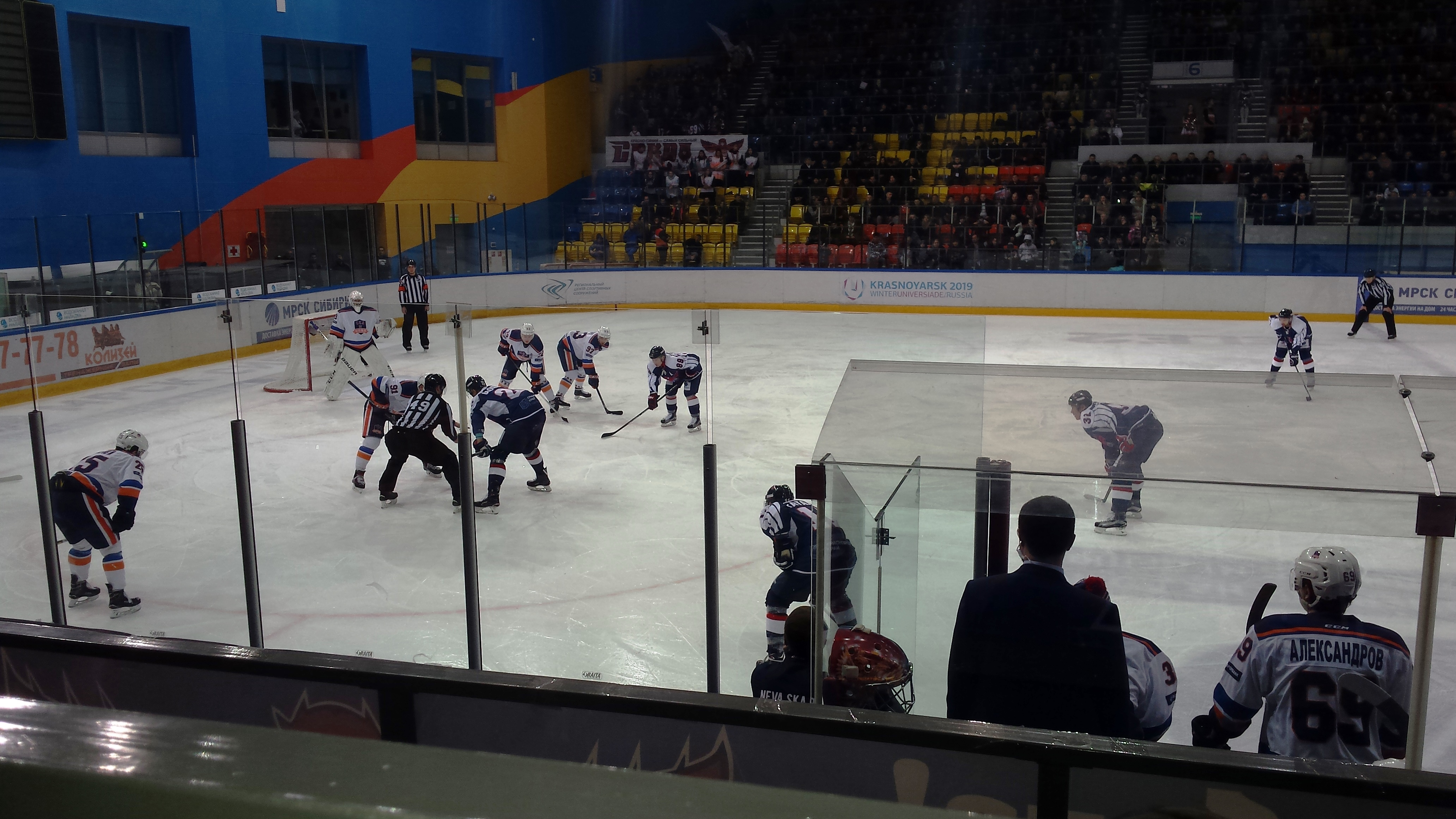 Матч на Арене-Север между Соколом и СКА-Невой